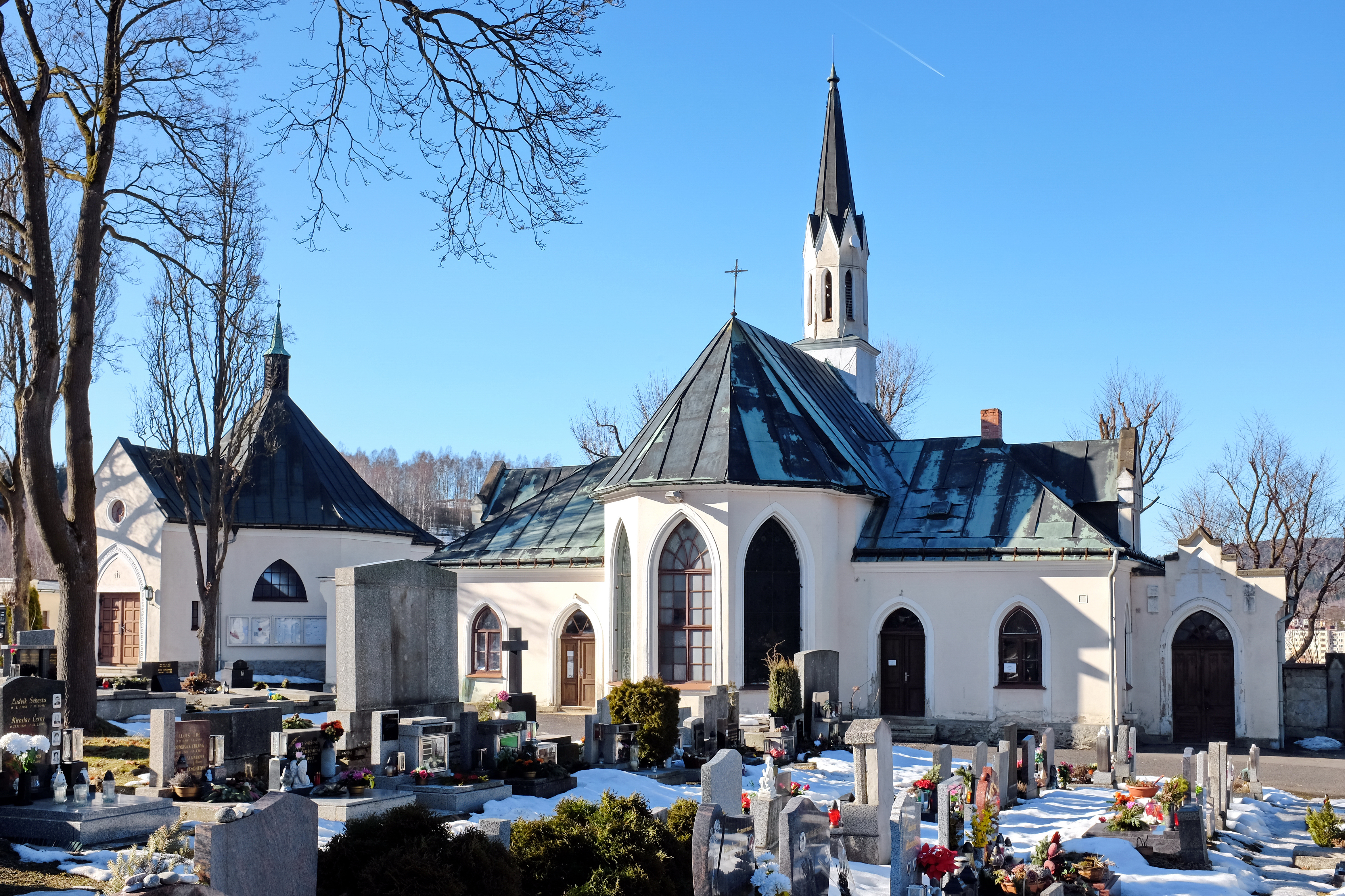 Hřbitovní kaple s rozlučkovou síní, Hřbitovní 800, Kraslice (okres Sokolov).